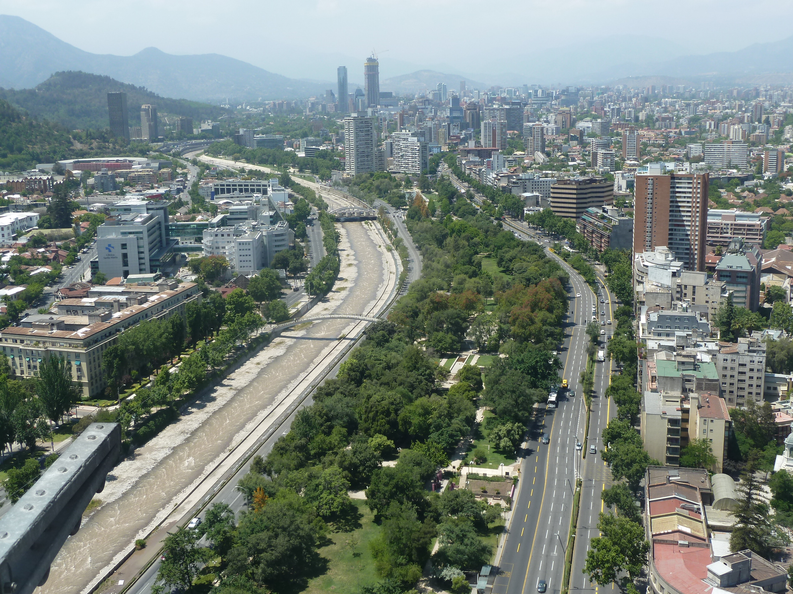 Avenida Providencia, Santiago de Chile.